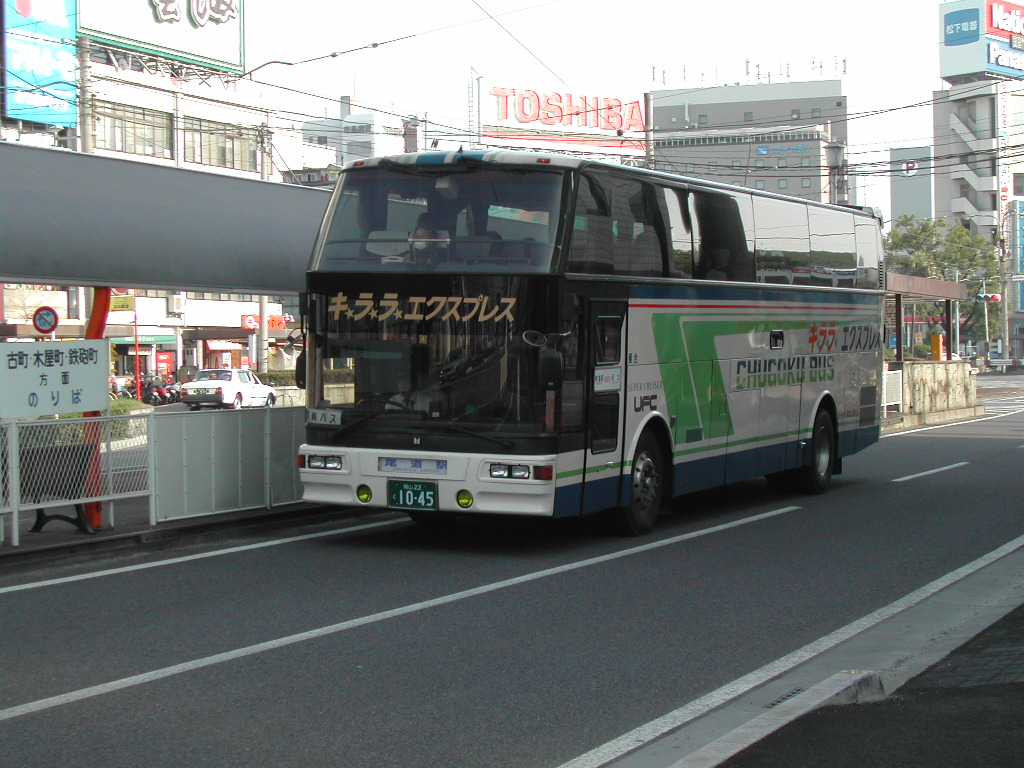 松山駅前にて 2002-3-16撮影